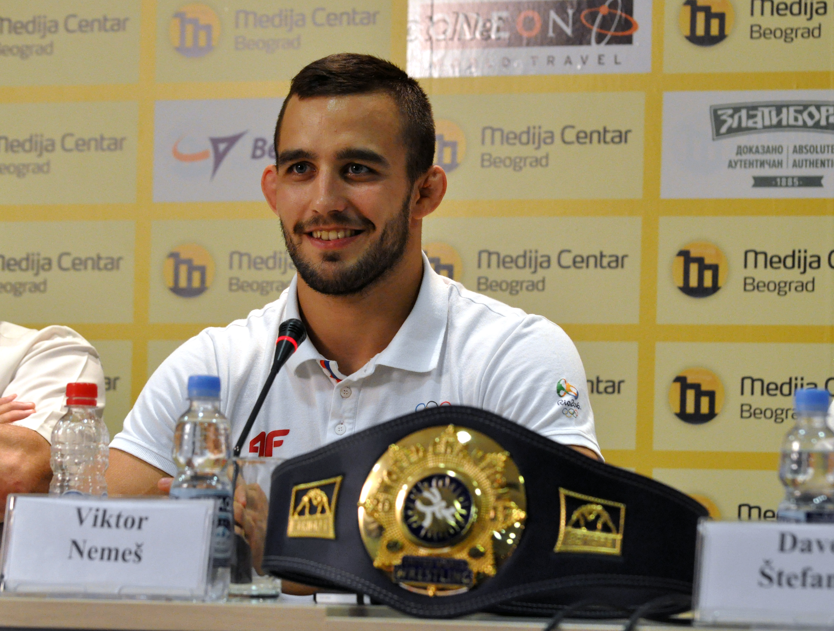 Виктор Немеш српски рвач